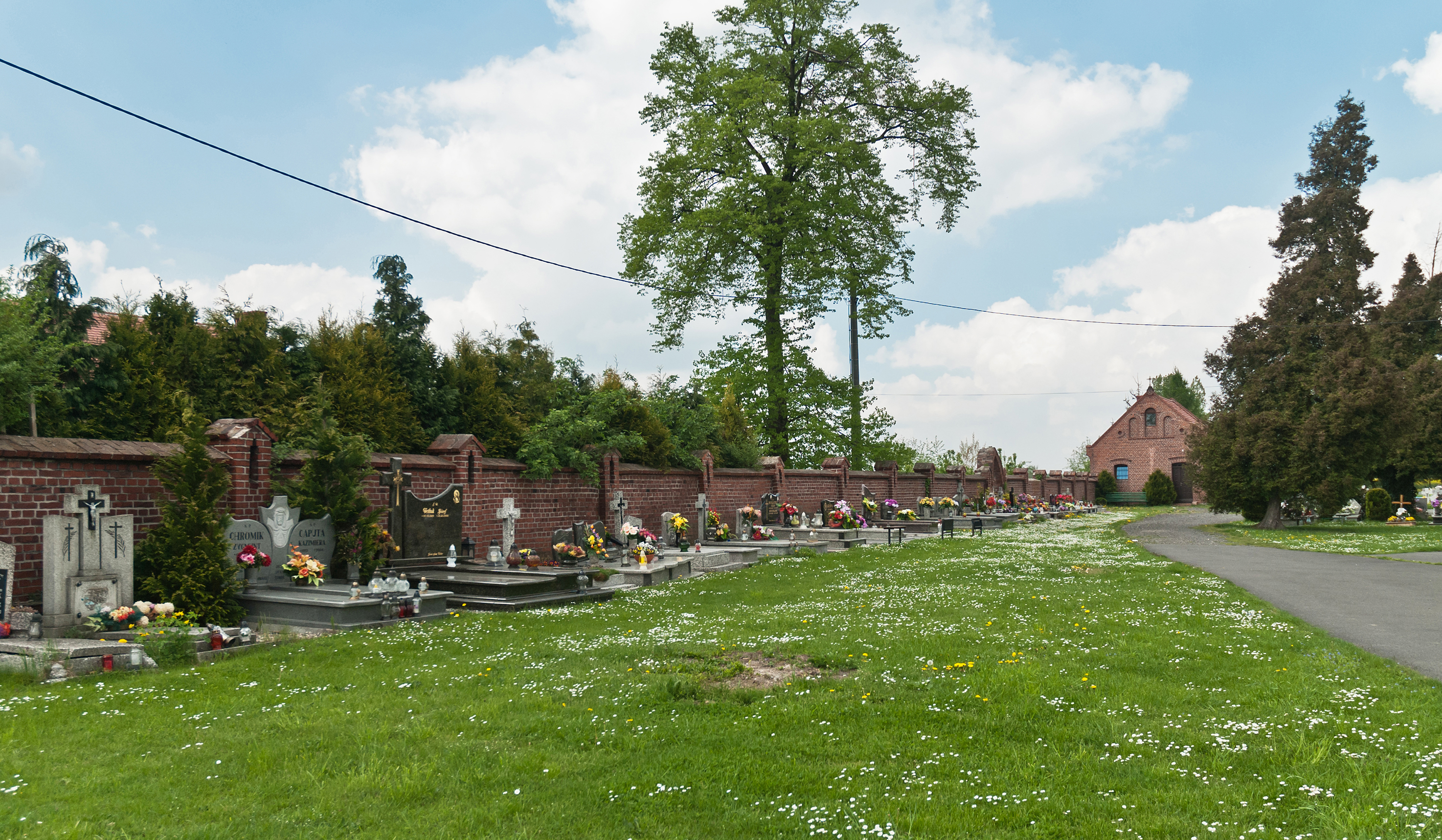 Kamienica, mur z bramkami, XVI, XVIII